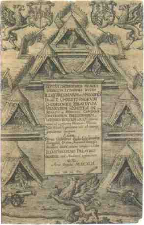 Тытульны ліст кнігі "Сем герояў Хадкевічаў". Медзярыт К. Гётке